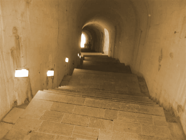 Srpski (latinica): Tunel ka Jezerskom vrhu na Lovćenu